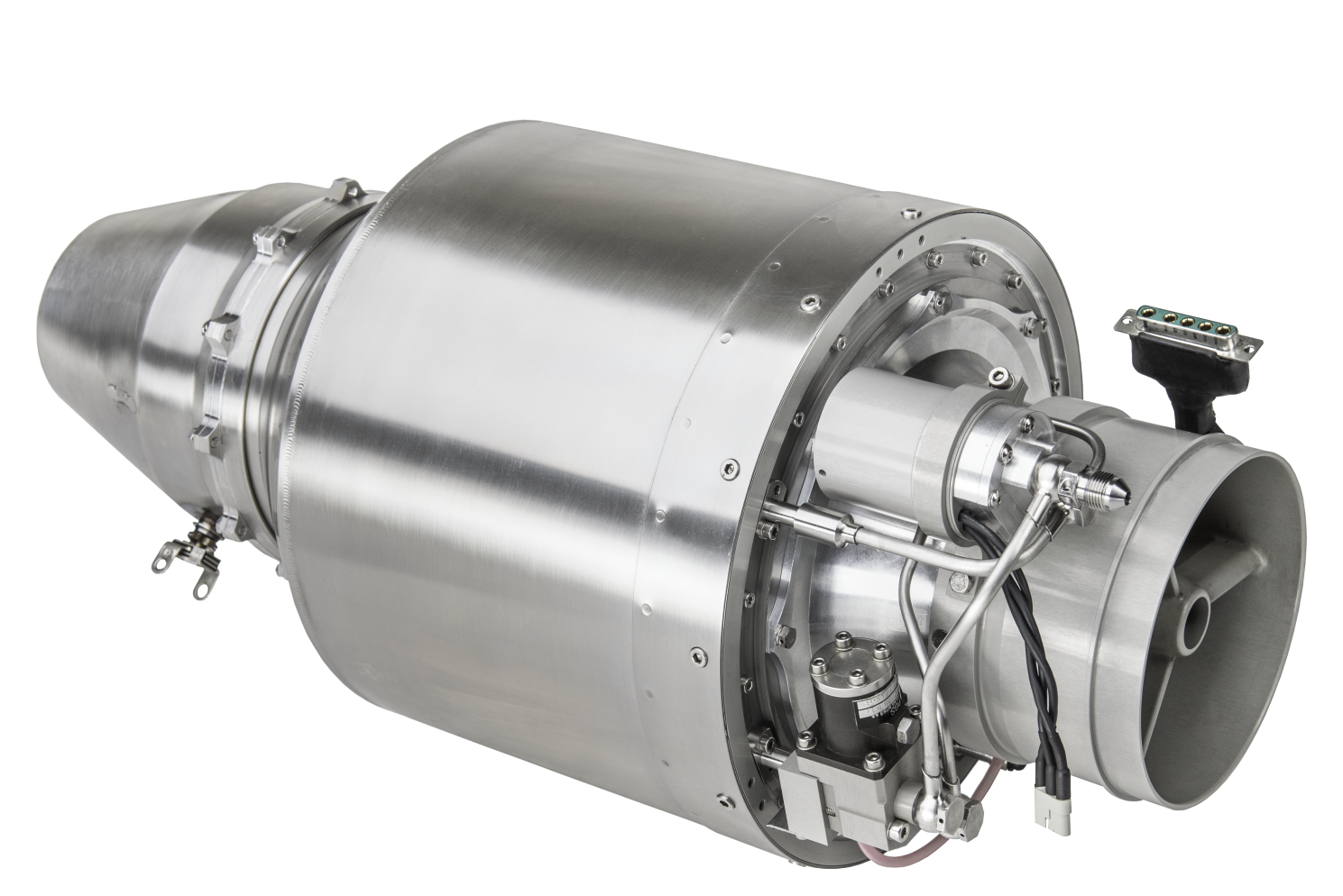 TJ80 zadní